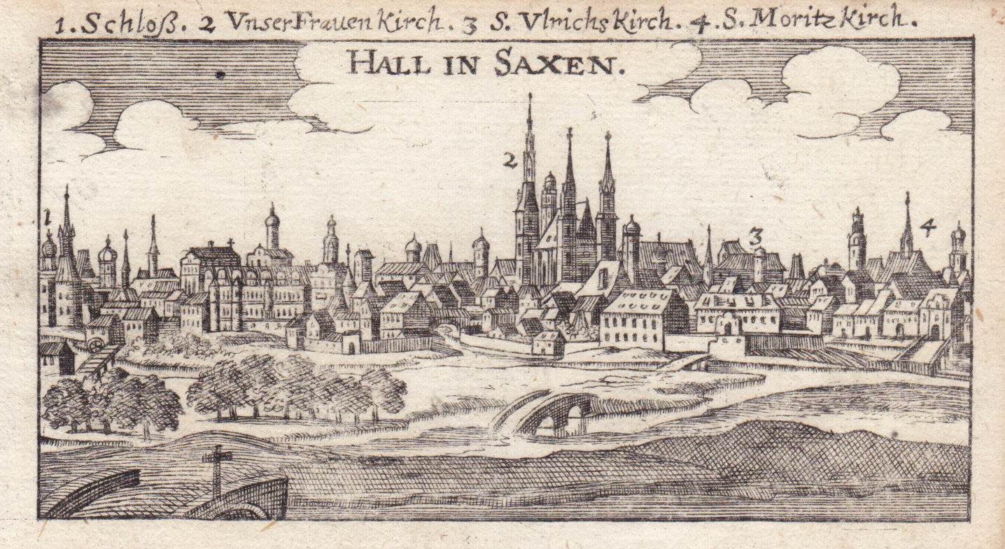 HALL IN SAXEN - copper engraving in: Christoff Riegel, Der getreue Reiß-Gefert durch Ober- und Nieder-Teutschland , Nürnberg, 1686